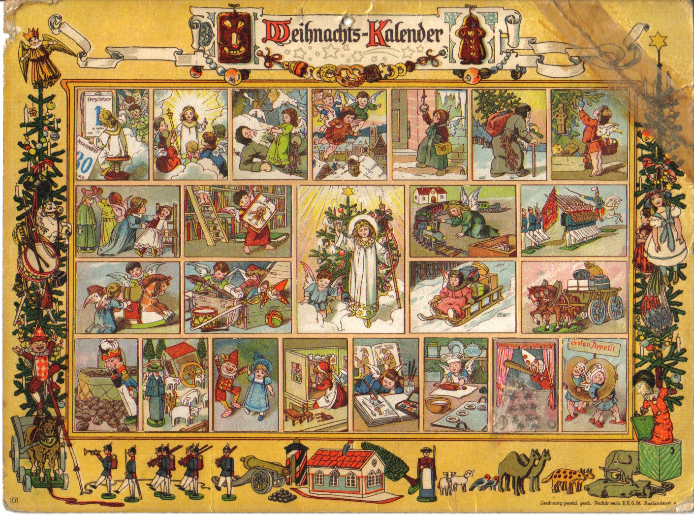 Adventskalender Im Lande des Christkinds. Die Fenster enthielten weihnachtliche Verse und konnten mit Bildern aus einem Ausschneidebogen überklebt werden. Vollständig überklebtes Exemplar. Erschienen bei Gerhard Lang in München.